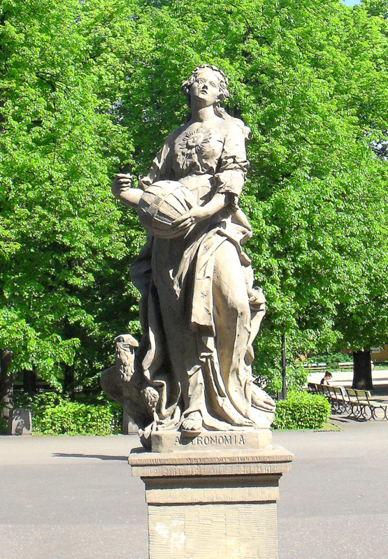 Warszawa. Ogród Saski, rzeźba Astronomia Jana Jerzego Plerscha